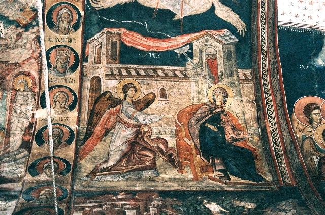 უბისა